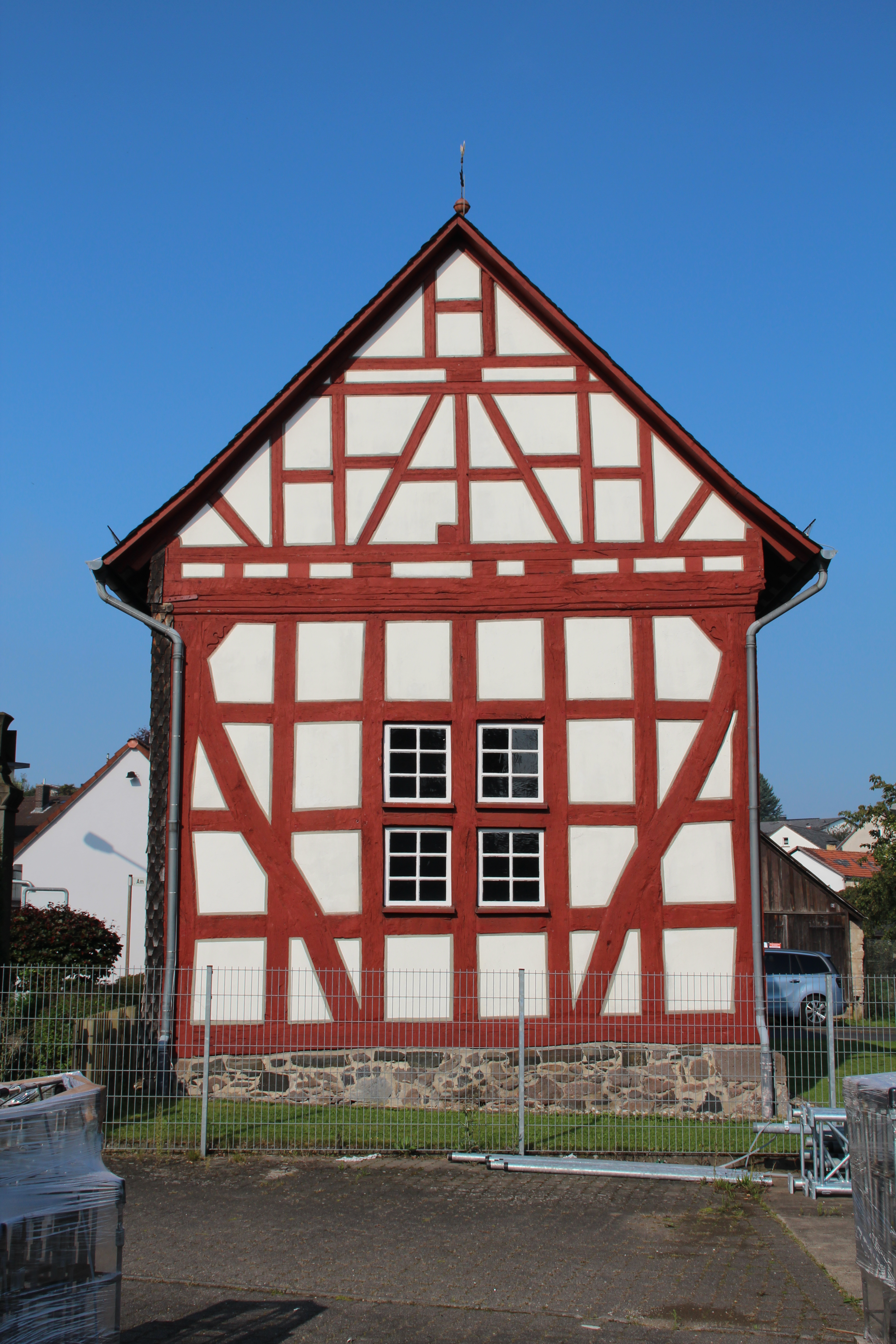 Evangelische Kirche Reinhardshain, Stadt Grünberg, Landkreis Gießen, Hessen, Deutschland